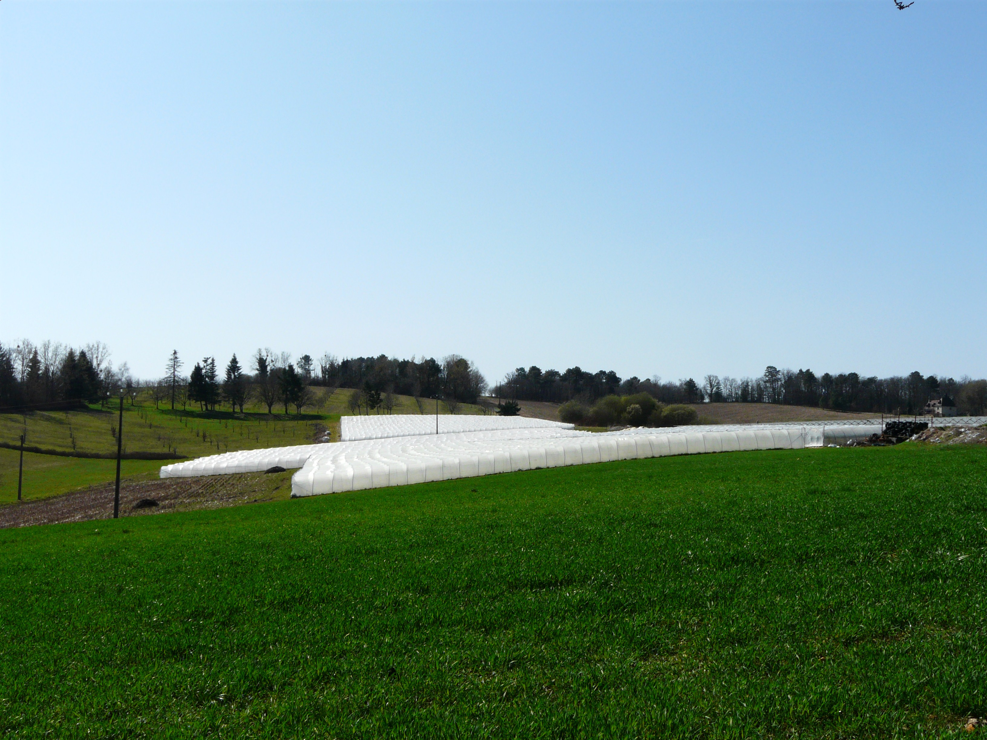 Tunnels de culture de fraises au lieu-dit les Martinies, La Douze, Dordogne, France.